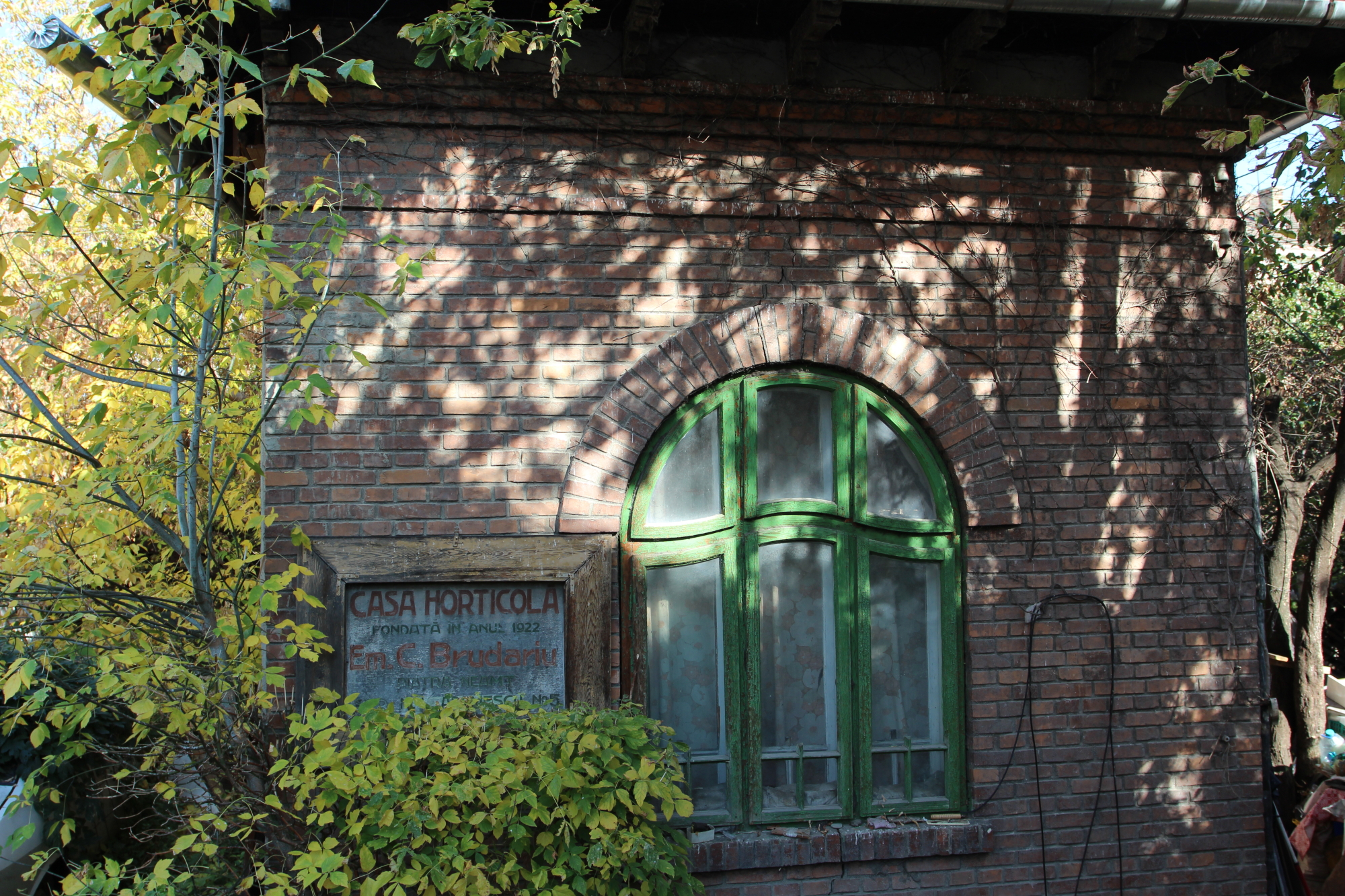 Casa horticultorului E. M. Brudariu